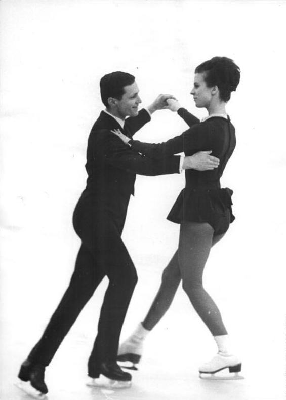 Annerose Baier, Eberhard Rüger Zentralbild Kohls 9.1.1966 Karl-Marx-Stadt: Deutsche Meisterschaften im Eiskunstlaufen. Im Eistanz liegen die Titelverteidiger Annerose Baier und Eberhard Rüger (SC Karl-Marx-Stadt) nach dem ersten Wettkampftag (8.1.1966) in der Karl-Marx-Städter Eissporthalle unangefochten an der Spitze (Platzziffer 5 und 19.48 Punkte).